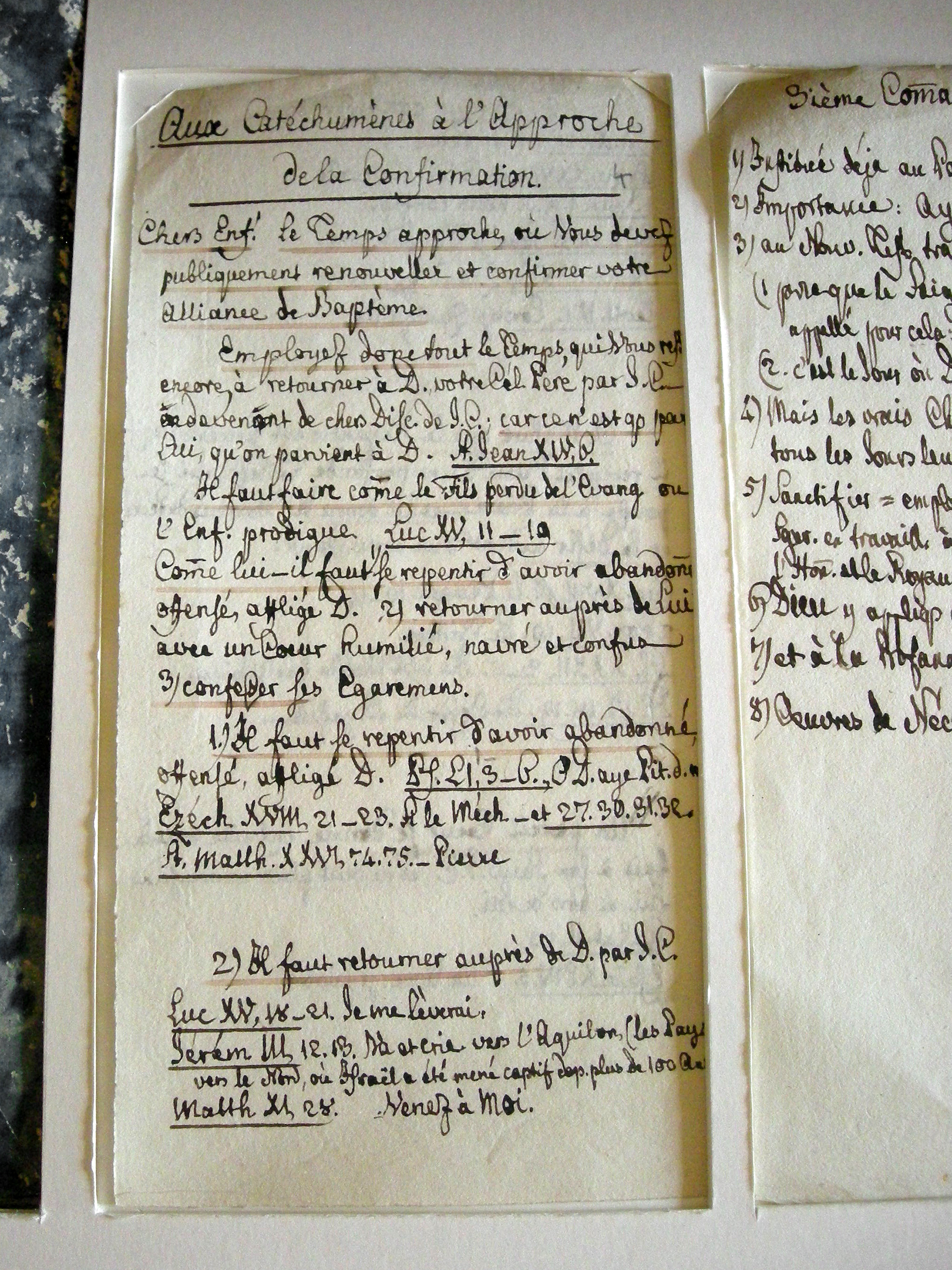 Instructions aux catéchumènes à l'approche de la Confirmation, par le pasteur Jean-Frédéric Oberlin au 18e siècle. Musée Jean-Frédéric Oberlin à Waldersbach (Bas-Rhin).